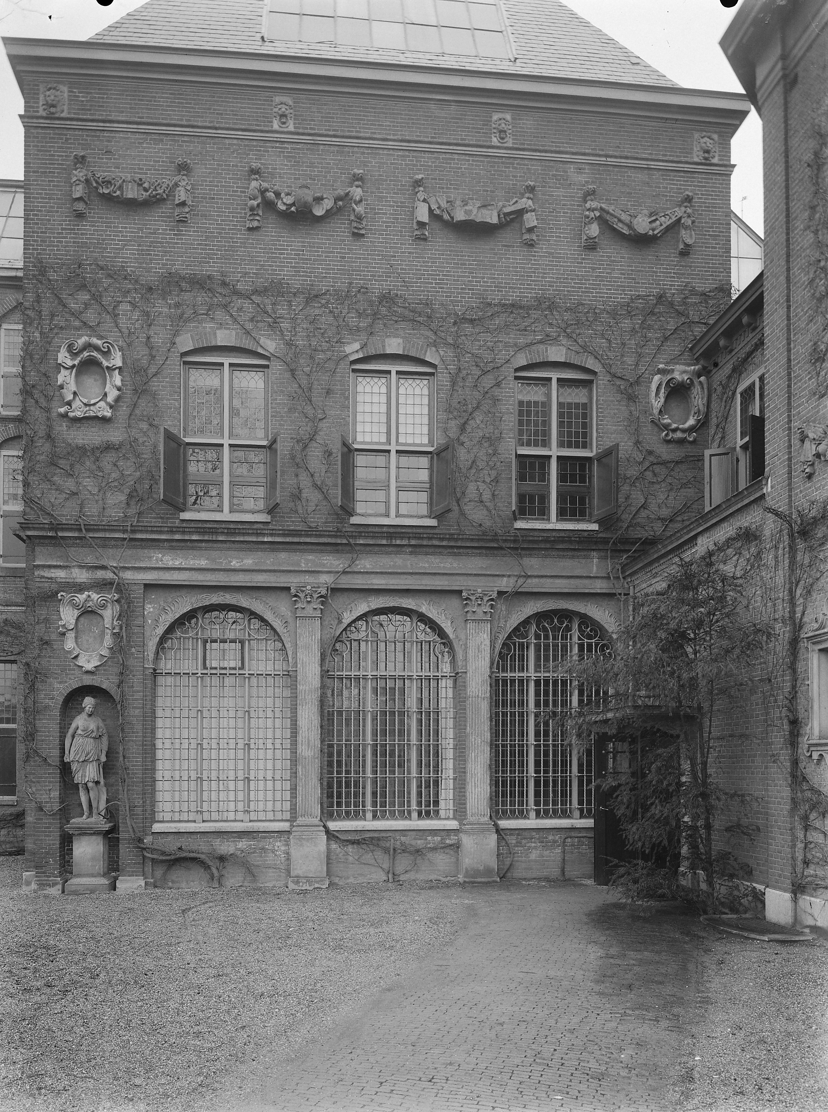 Rijksmuseum: Gevel met bouwfragmenten. Het beeld linksonder is afkomstig van het Huygenshuis in Den Haag en werd vervaardigd door Pieter Adriaensz 't Hooft (1610-1649/50). Ter rechterzijde stond ooit een tweede beeld van dezelfde maker en afkomst, dat eerder werd verwijderd voor de realisering van een aanbouw. Ook de bogen op de begane grond zijn afkomstig uit het Huygenshuis.